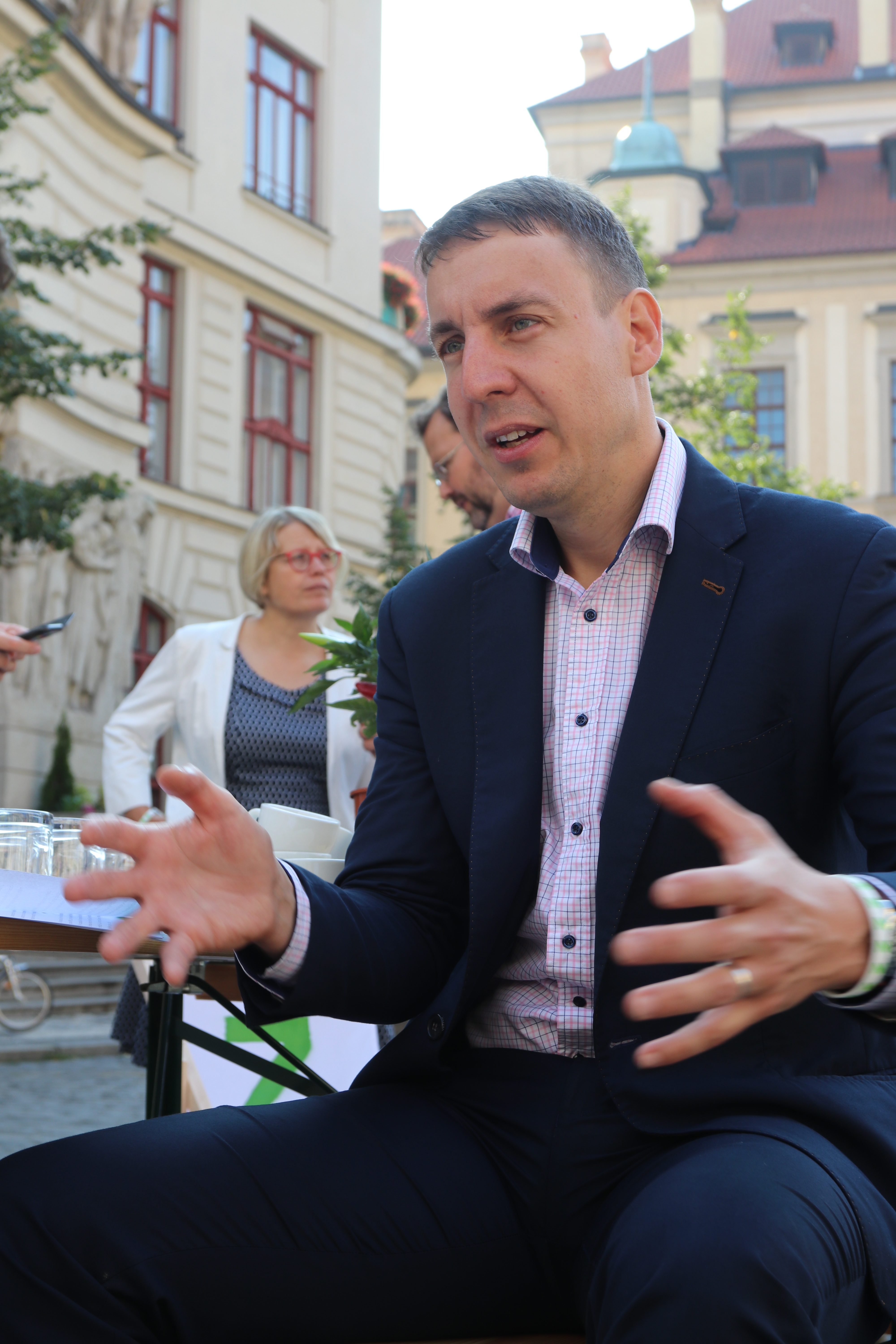 Ondřej Mirovský (* 24. ledna 1979 Praha) je český komunální politik, přírodovědec, specialista na družicové systémy pro pozorování Země, národní expert pro rámcové programy pro vědu a výzkum Horizont 2020, byl také vůdčí osobností kampaně Zachraňme Letnou.[1] Je spojován také s bojem proti hazardu a hernám v Praze. Od roku 2014 zastupitel Hlavního města Prahy, od roku 2006 zastupitel Městské části Praha 7, člen Strany zelených. Od roku 2014 je rovněž v dozorčí radě Technické správy komunikací hlavního města Prahy a.s..